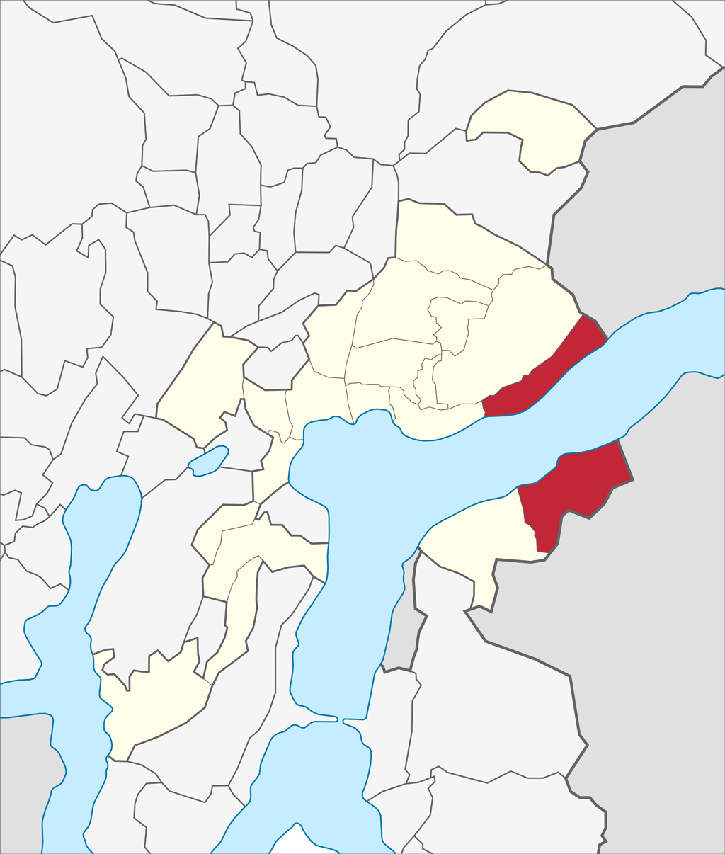 Localizzazione del quartiere di Gandria nel territorio comunale di Lugano